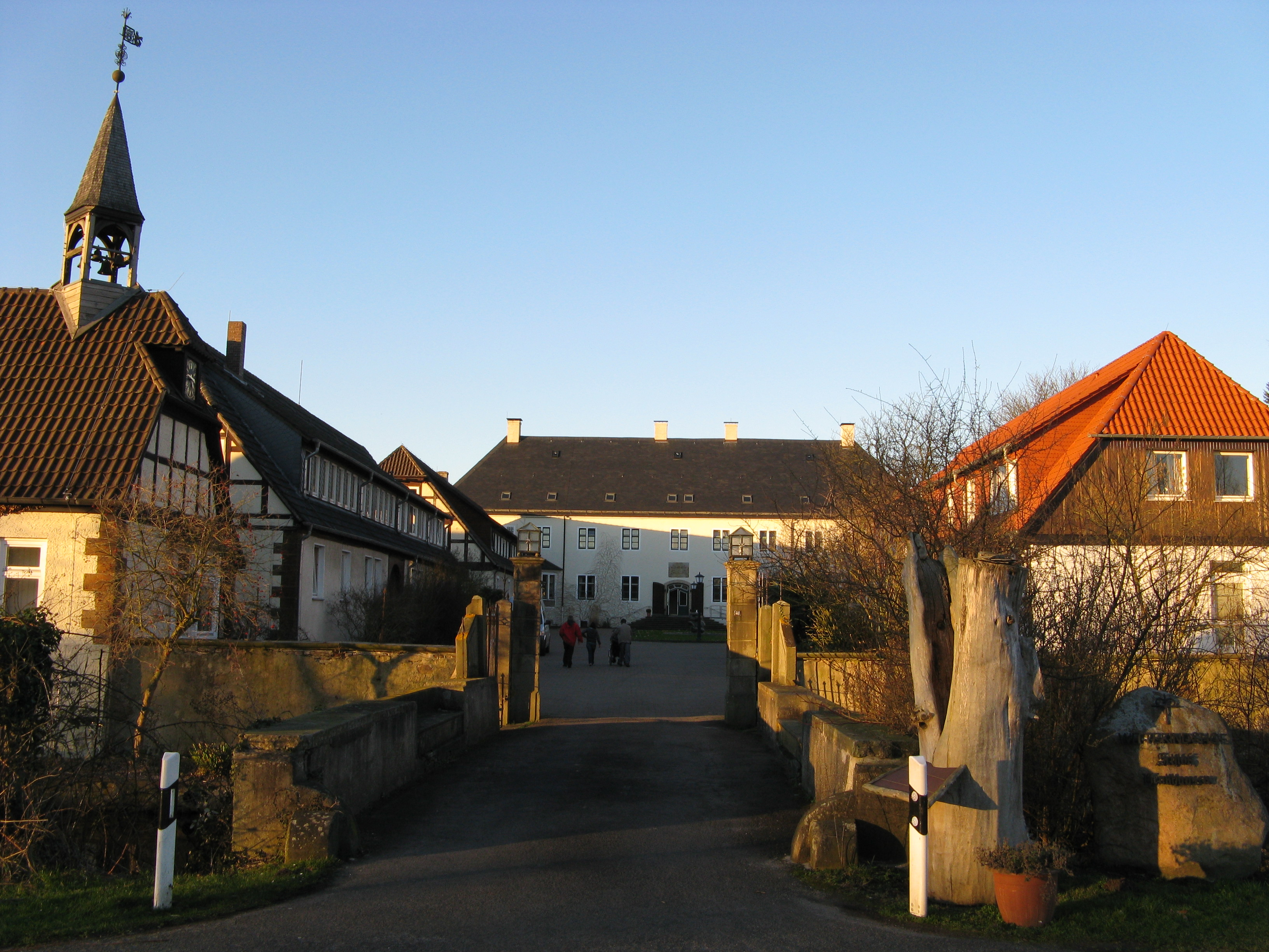 Schloss Benkhausen